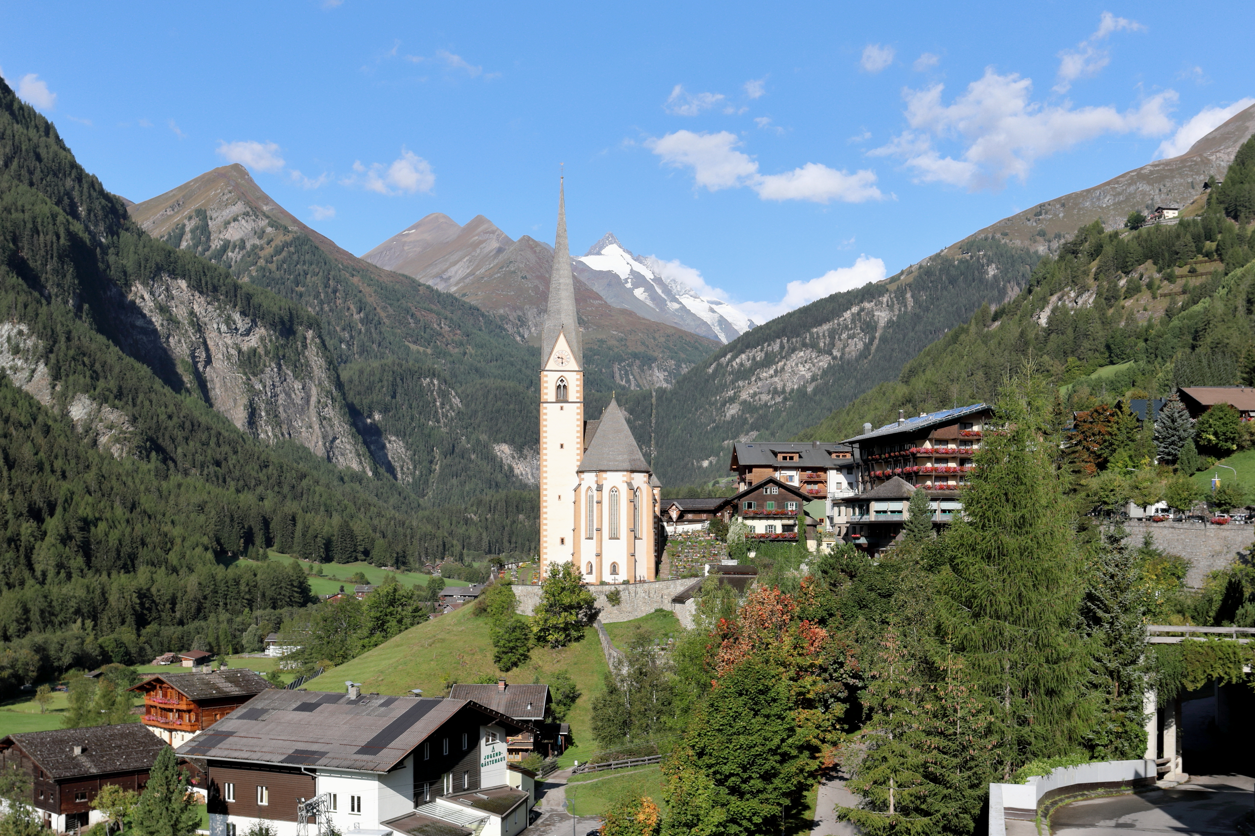 Ostsüdostansicht des Ortszentrums der österreichischen Gemeinde Heiligenblut am Großglockner in Kärnten mit dem Großglockner im Hintergrund.